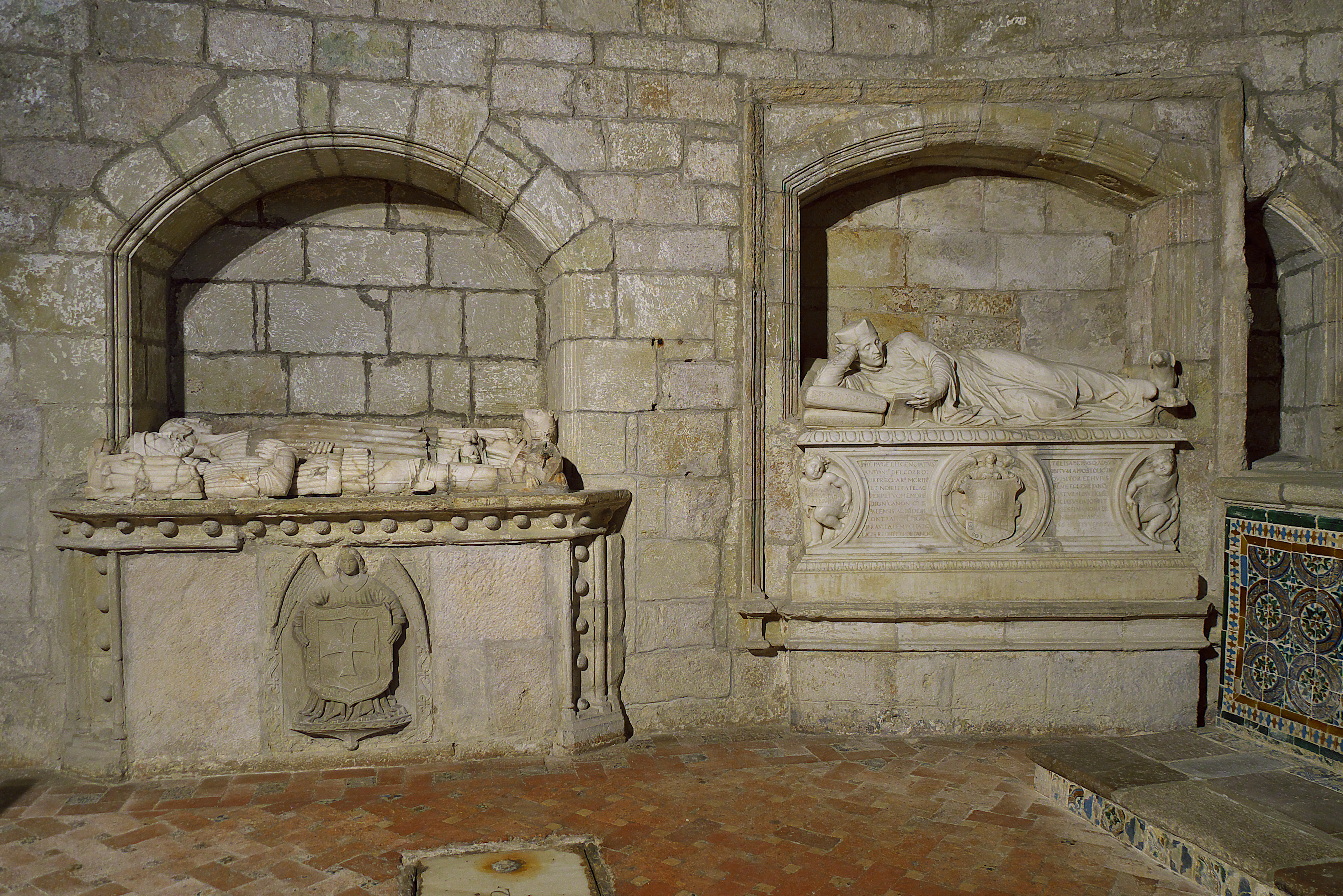 Iglesia de Santa María de los Ángeles (San Vicente de la Barquera). Domenico Fancelli trae a Sevilla la escultura funeraria renacentista con el sepulcro del Arzobispo, Diego Hurtado de Mendoza y Quiñones (1509). El inquisidor Antonio del Corro (1472-1556), humanista, canónigo de la Catedral de Sevilla, fundador del Hospital de la Concepción (San Vicente de la Barquera), patrocinador de una capilla funeraria en la Iglesia de San Vicente de la Barquera), contrata a Juan Bautista Vázquez el Viejo su sepulcro en mármol de Carrara, con boceto de Hernán Ruiz el Joven (1564). Otros sepulcros paralelo de principios del XVI, Sepulcro de Roberto de Santisteban, Iglesia de San Martín de Tours (Salamanca) Sepulcro de Ascanio Sforza (Andrea Sansovino) Sepulcro de Girolamo Basso della Rovere (Andrea Sansovino)